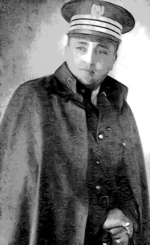 Coronel Roderico Anzueto, jefe de la Policía del gobierno del general Jorge Ubico